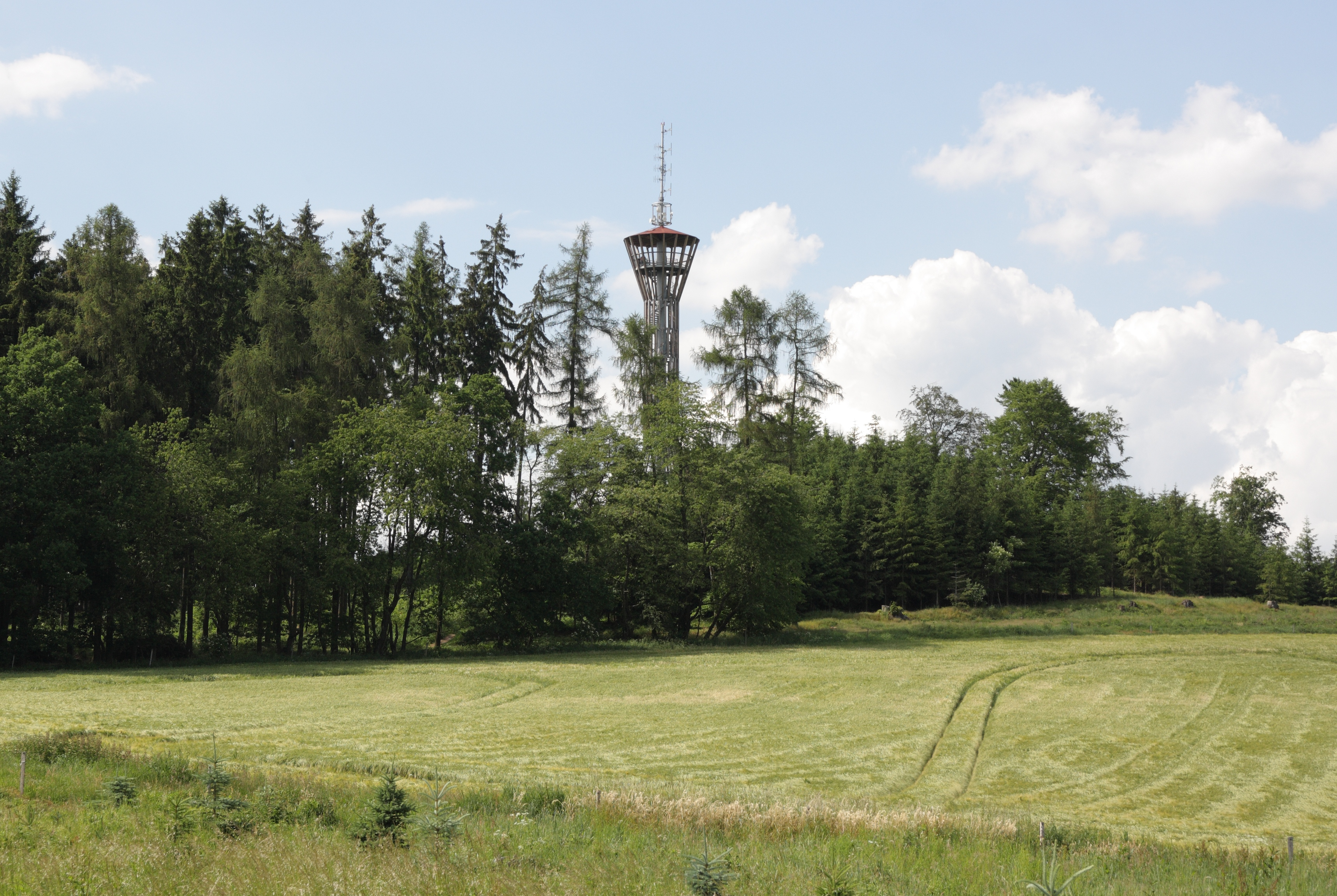 Lbosín - vrch Březák s rozhlednou Špulka.